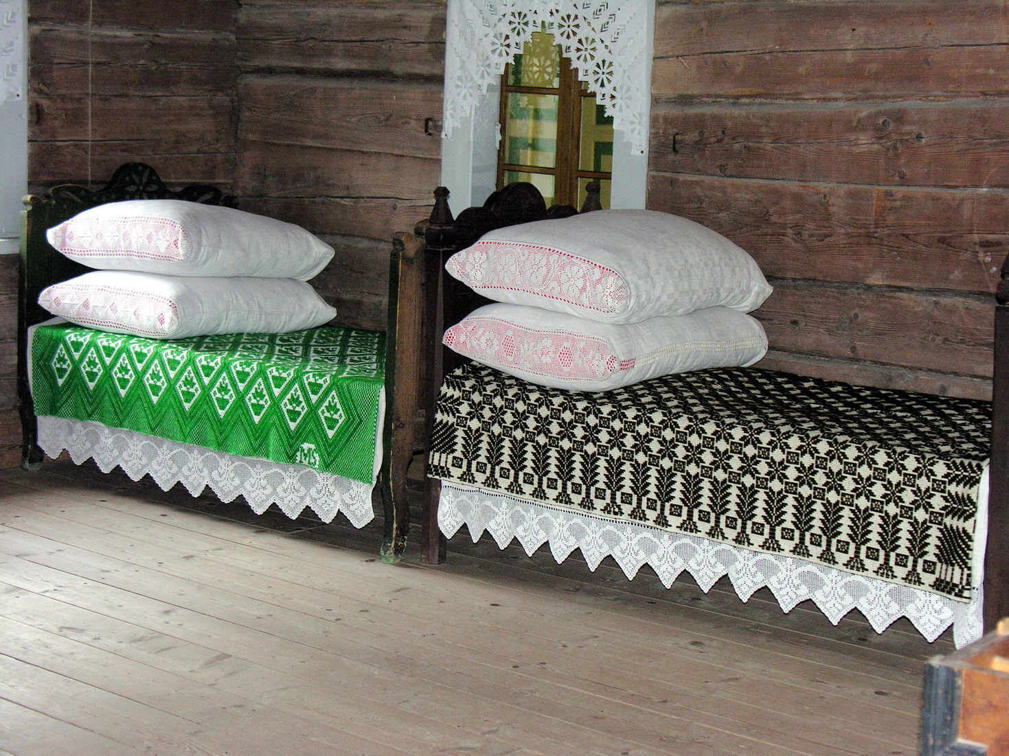 Rūmas, vidus 2007 m. balandžio 21 d., Lietuva